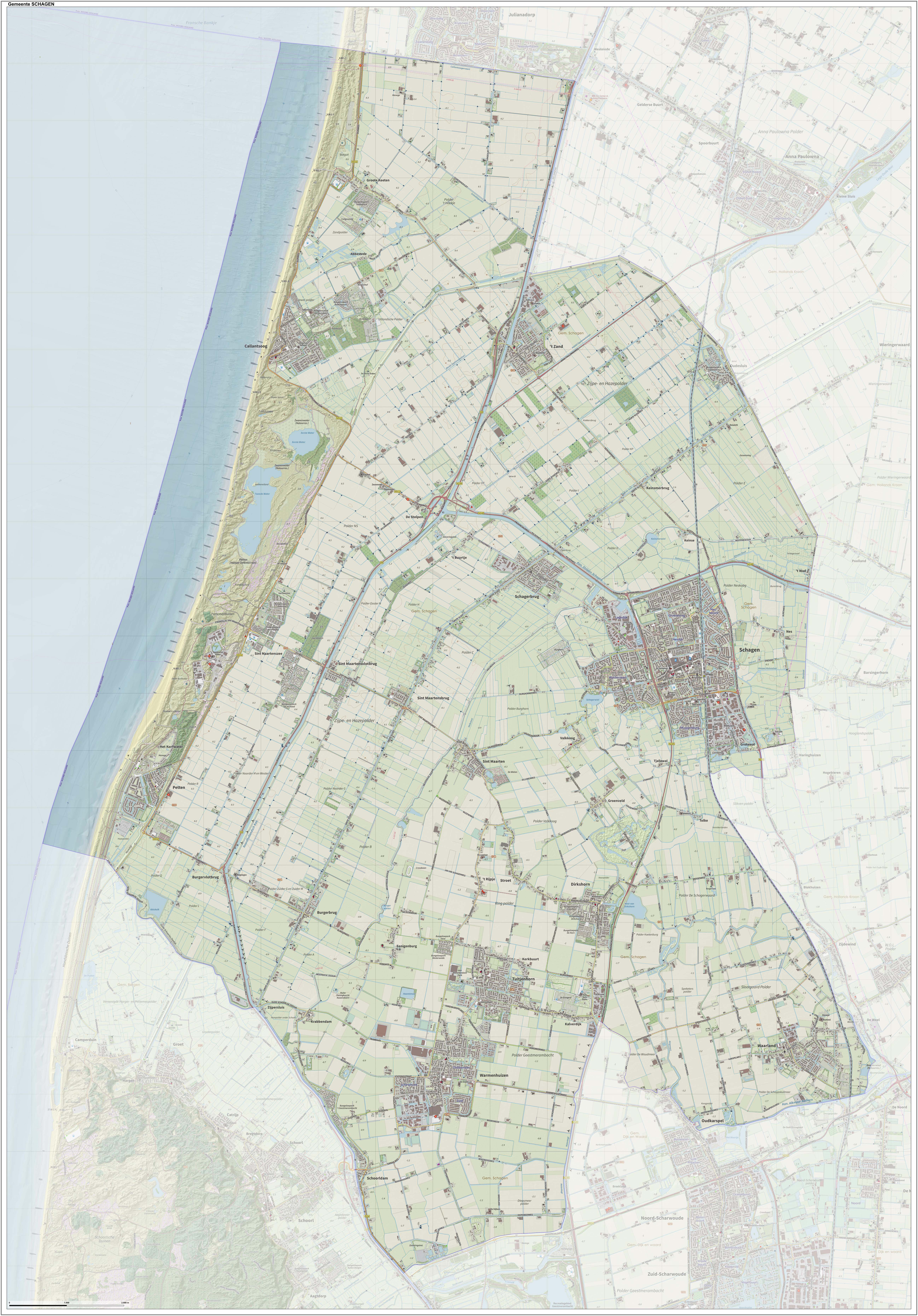 Topografische gemeentekaart. Resolutie: 400 pixels/km. Kaartbeeld samengesteld uit de open geodata van de Top10NL en Top25namen (Kadaster), Creative Commons-BY licentie. Gebouwvlakken uit open geodata BAG extract. Wegen uit de OpenStreetMap, OpenStreetMap community. Reliëfschaduw uit de Actuele Hoogtekaart AHN2. Samenstelling en kleurenschema: Jan-Willem van Aalst, met QGIS. Zie ook de Legenda.